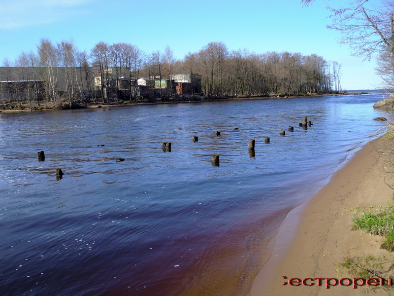 Сестрорецк. Дубки. Место пристани для морских теплоходов